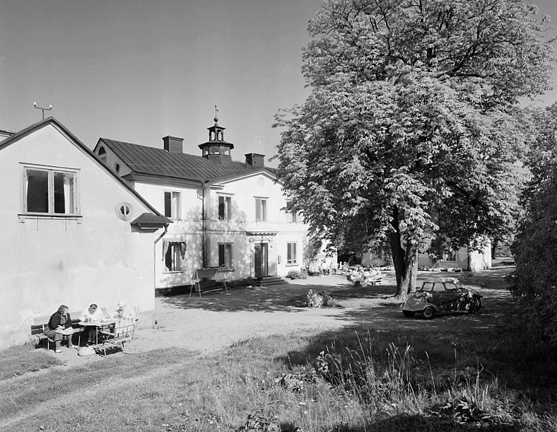 Karlshälls gård på Långholmen